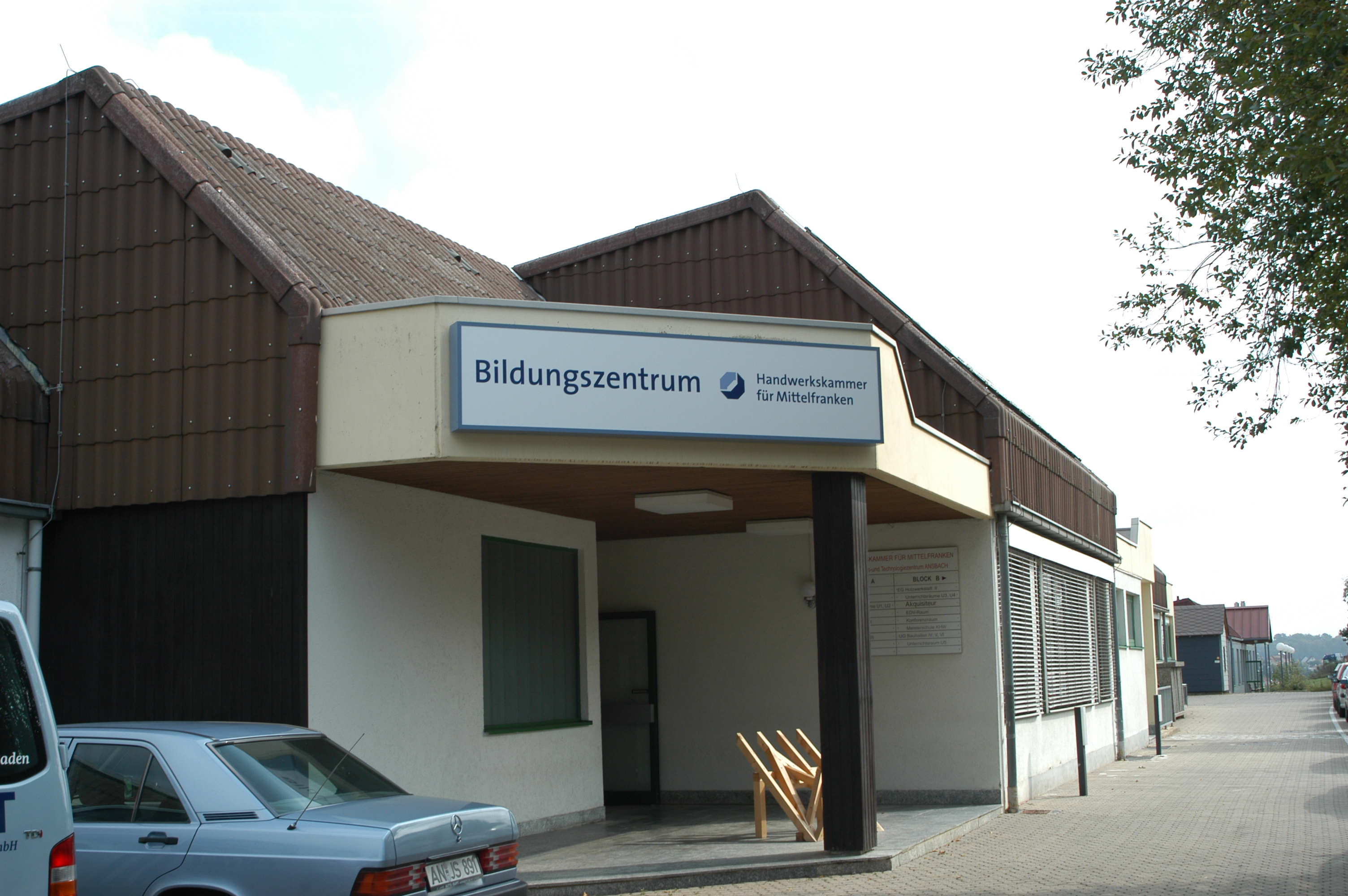 Im Bildungszentrum Ansbach werden Bauberufe unterrichtet.